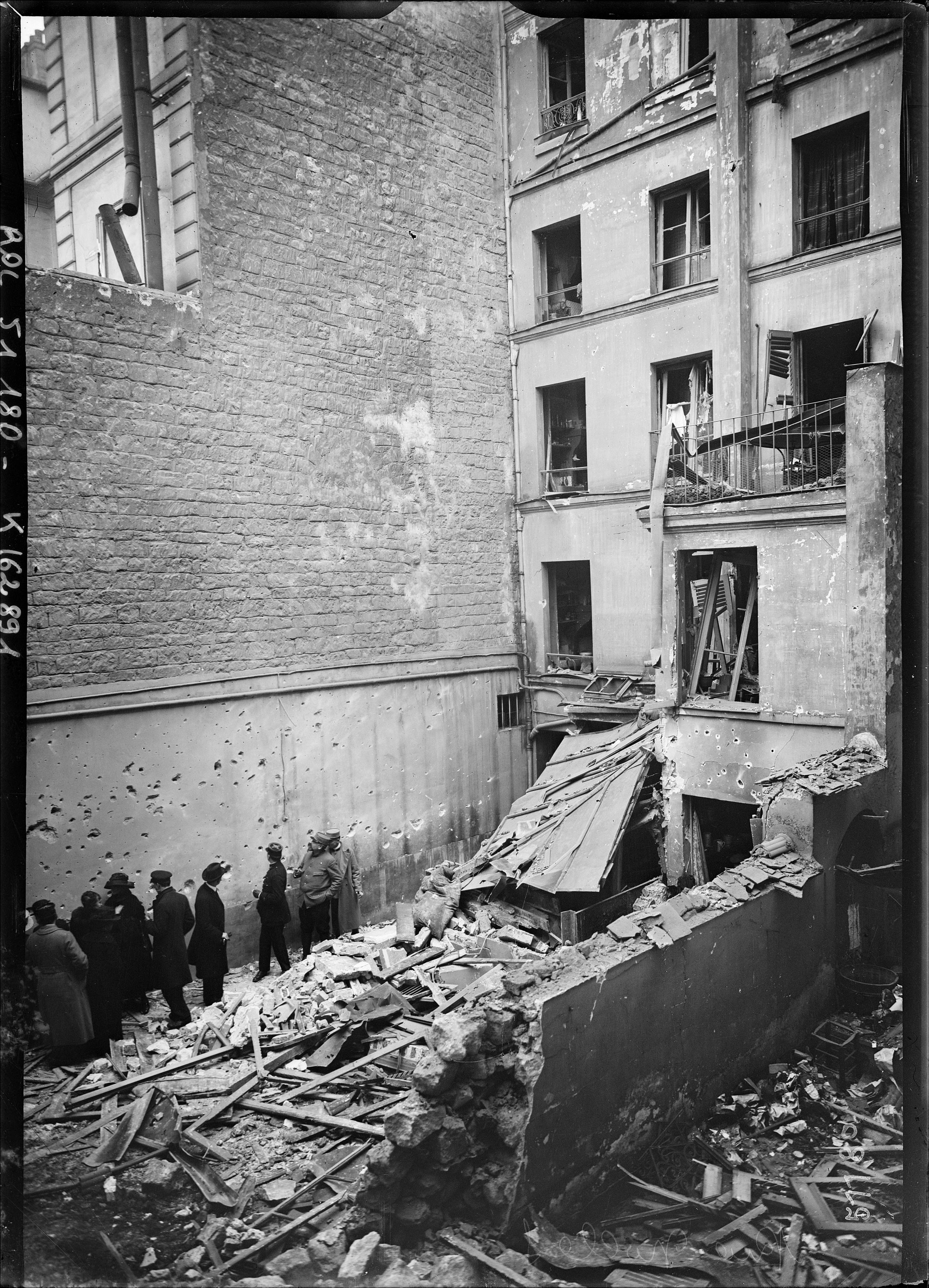 Dégâts dus aux bombardements par avions du 8 mars1918